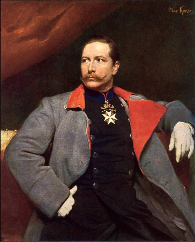 Wilhelm II., Deutscher Kaiser im grauen Militärmantel, nach einem Gemälde von Max Koner, 1892